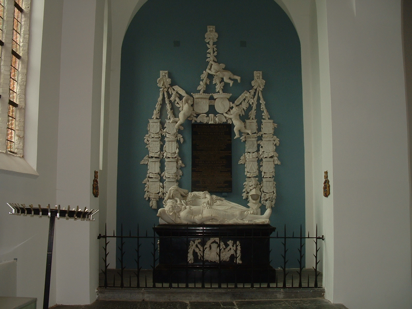 Praalgraf, Dorpskerk Katwijk